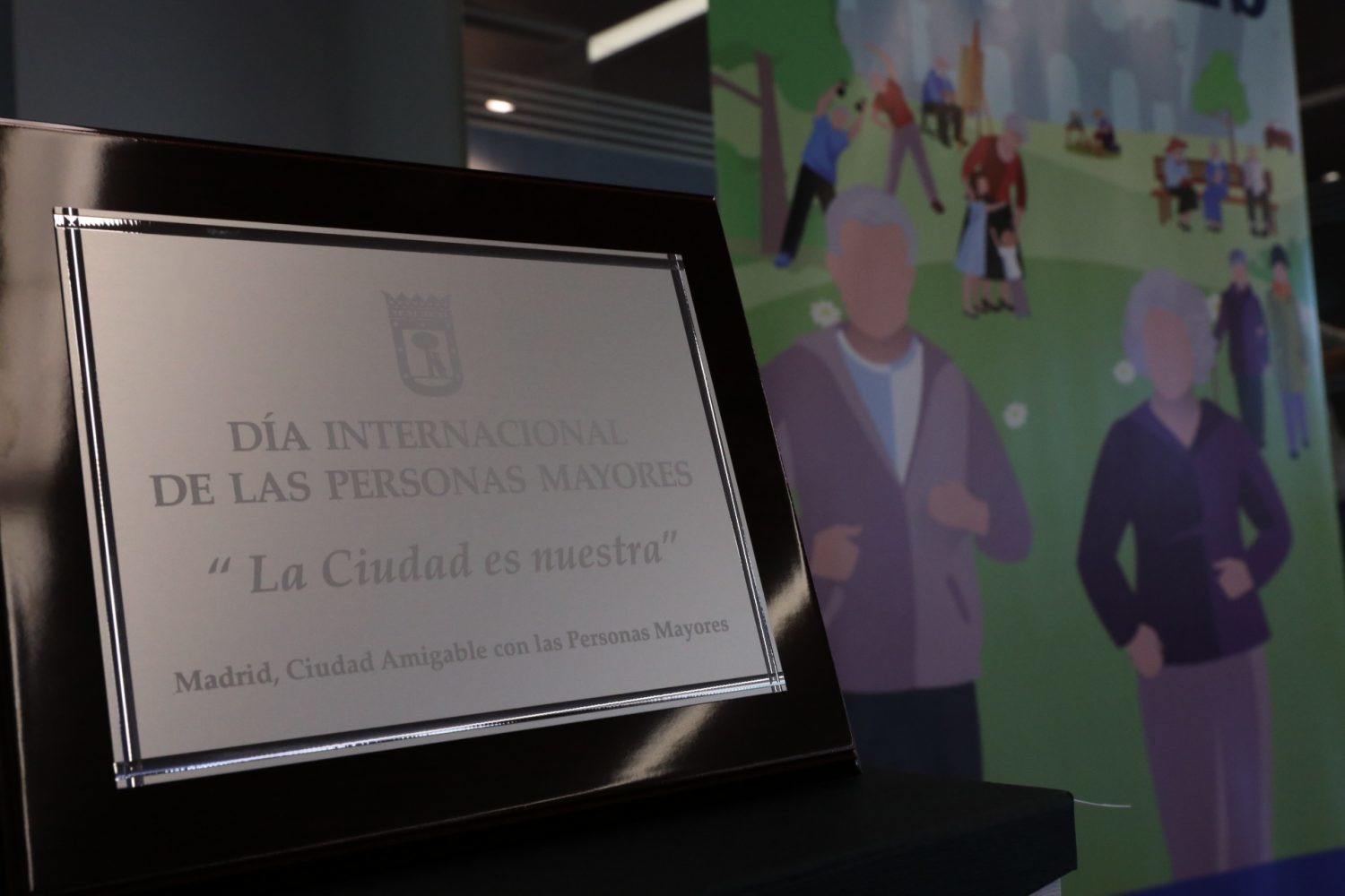 Manuela Carmena, alcaldesa de Madrid, ha compartido la tarde con las personas mayores de los centros municipales para conmemorar el Día Internacional de las Personas Mayores, bajo el lema municipal La ciudad es nuestra. Al acto han asistido la delegada de Equidad, Derechos Sociales y Empleo, Marta Higueras, la concejala del Grupo Municipal del Partido Popular, Beatriz Elorriaga, el concejal socialista, Ignacio de Benito y la concejala de Ciudadanos, Ana Domínguez.